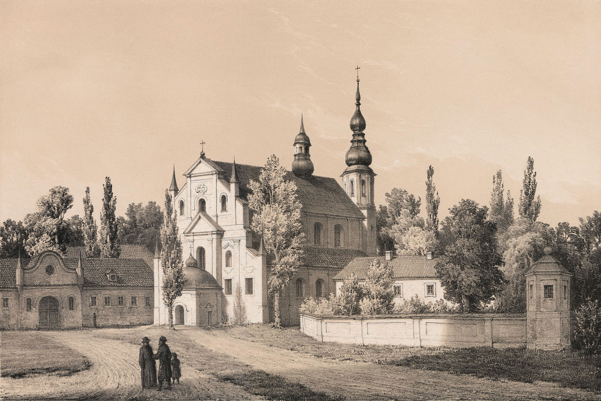 Беларуская (тарашкевіца): Бяроза Картуская (Biaroza Kartuskaja). Касьцёл Сьвятога Крыжа і кляштар картузаў